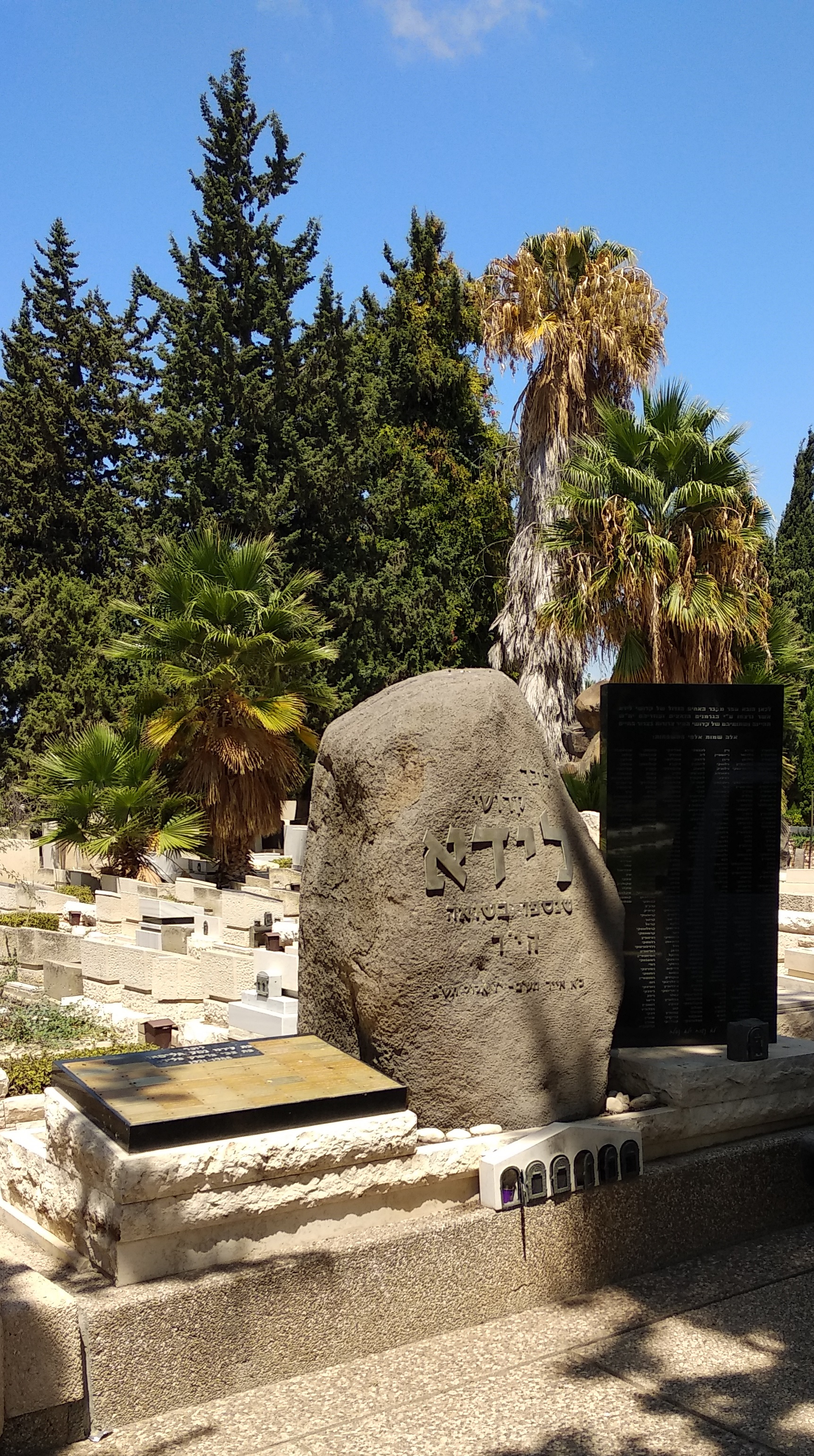 אנדרטה לזכר יהודי לידא שנספו בשואה, בבית הקברות נחלת יצחק